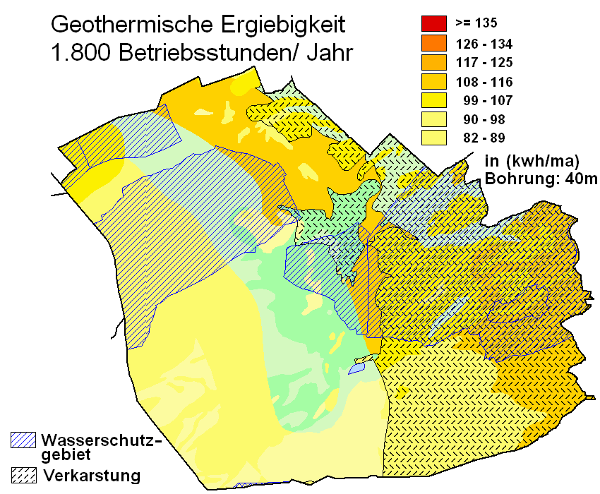 geothermische Karte Schlangen (Gemeinde)